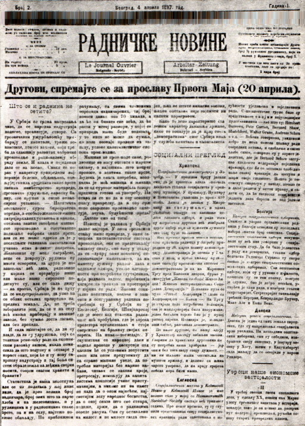 Naslovna stranica Radničkih novina iz 1897.